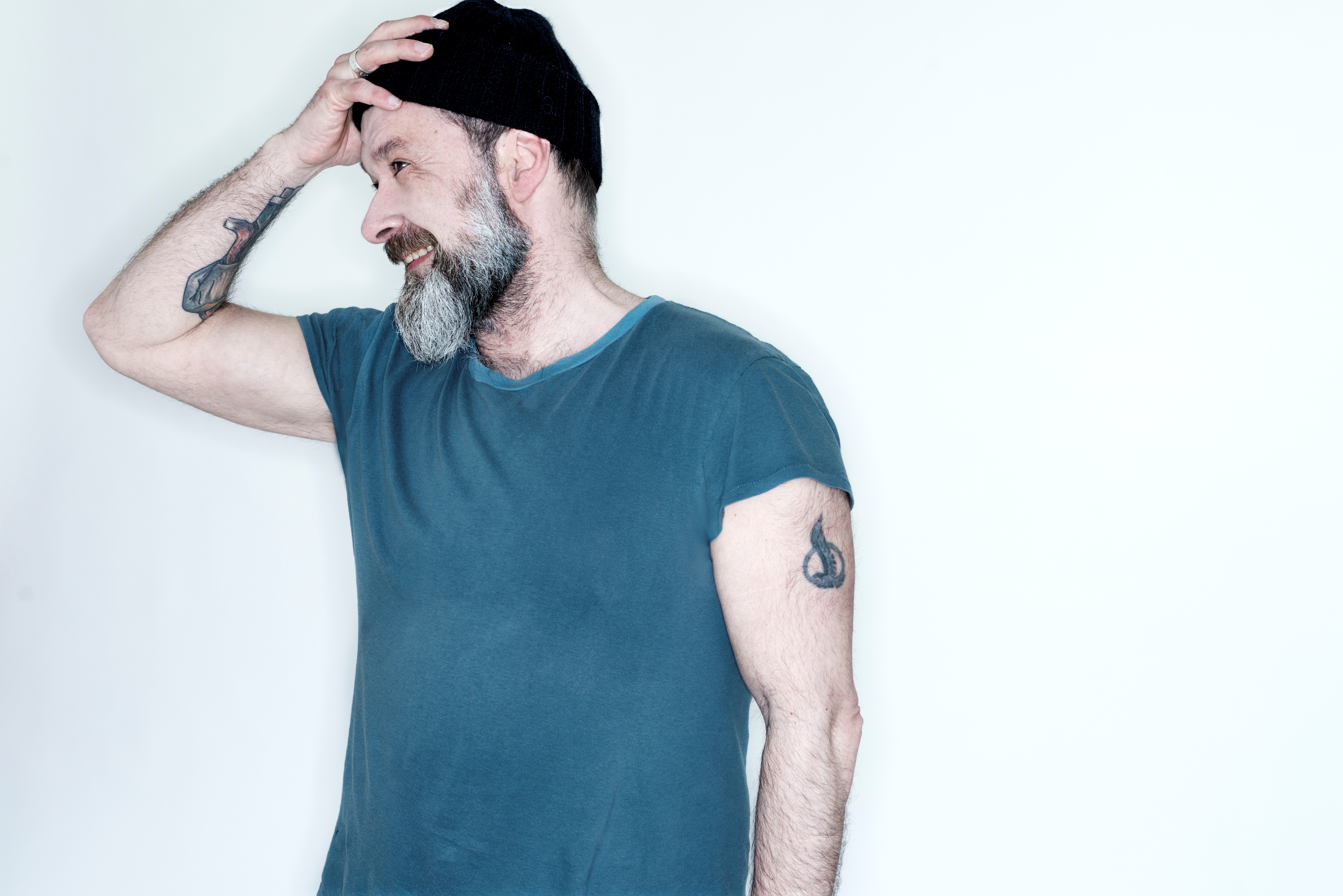 Foto: Ulrica Zwenger